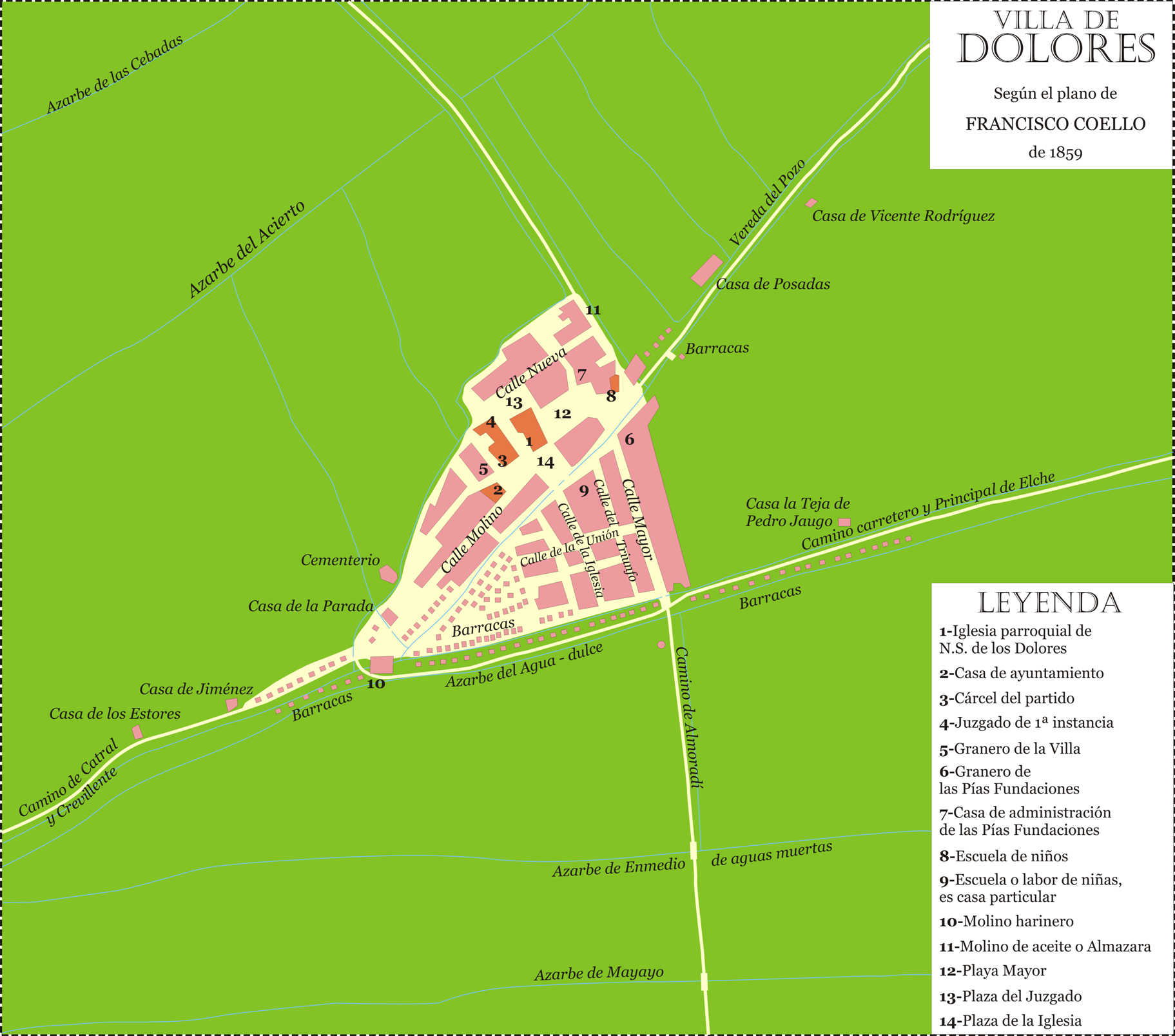 Plano de Dolores (Alicante) basado en el de Francisco Coello de 1859